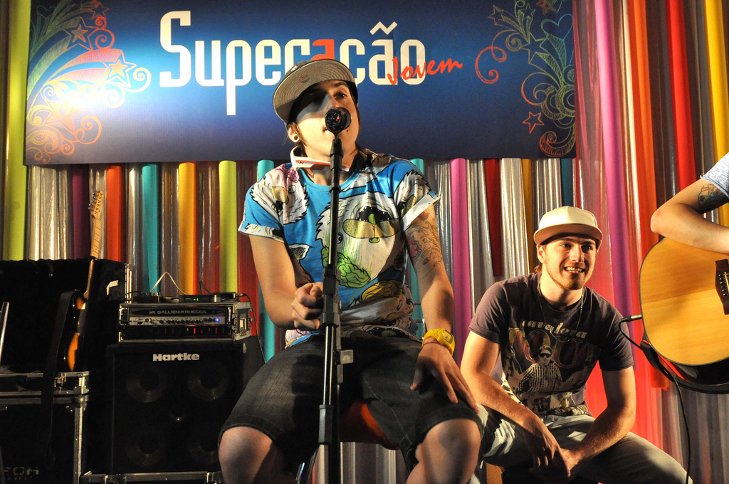 Banda Cine no Circuito 2010.